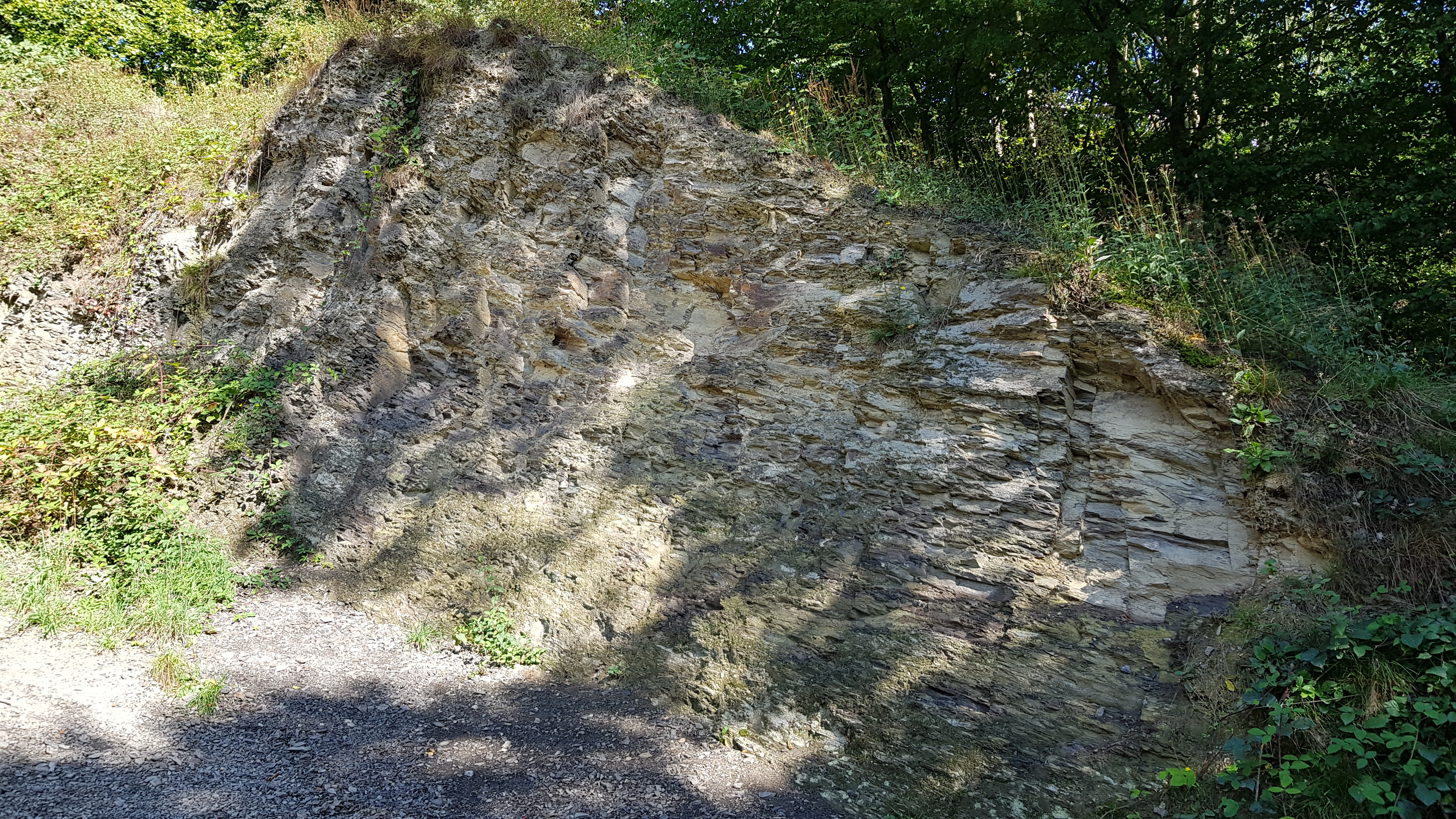 Geologisch monument Heimansgroeve, Vaals, Nederland